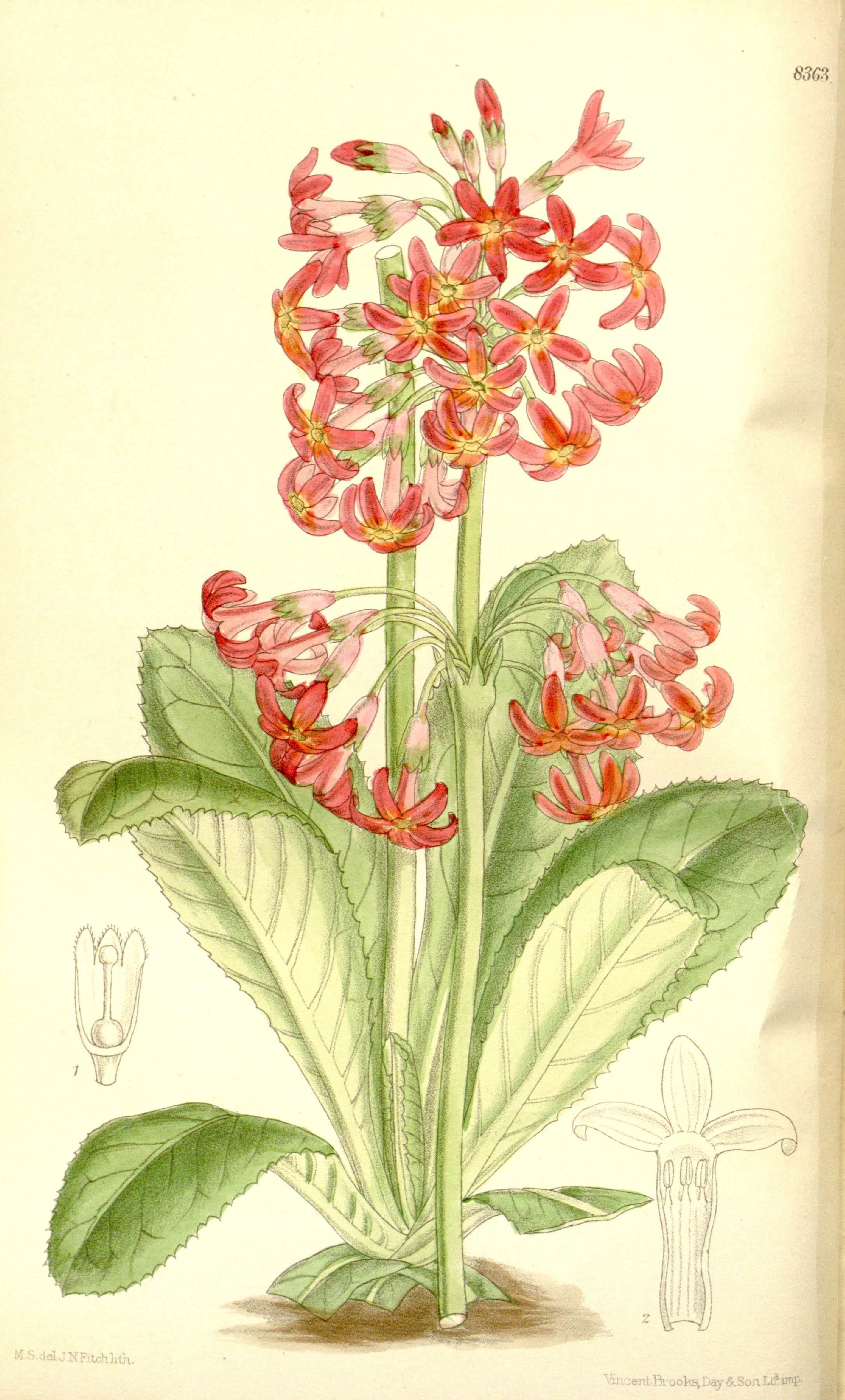 Primula maximowiczii, Primulaceae